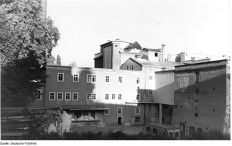 Original image description from the Deutsche Fotothek Dresden-Plauen. Bienertmühle (frühere Hofmühle)